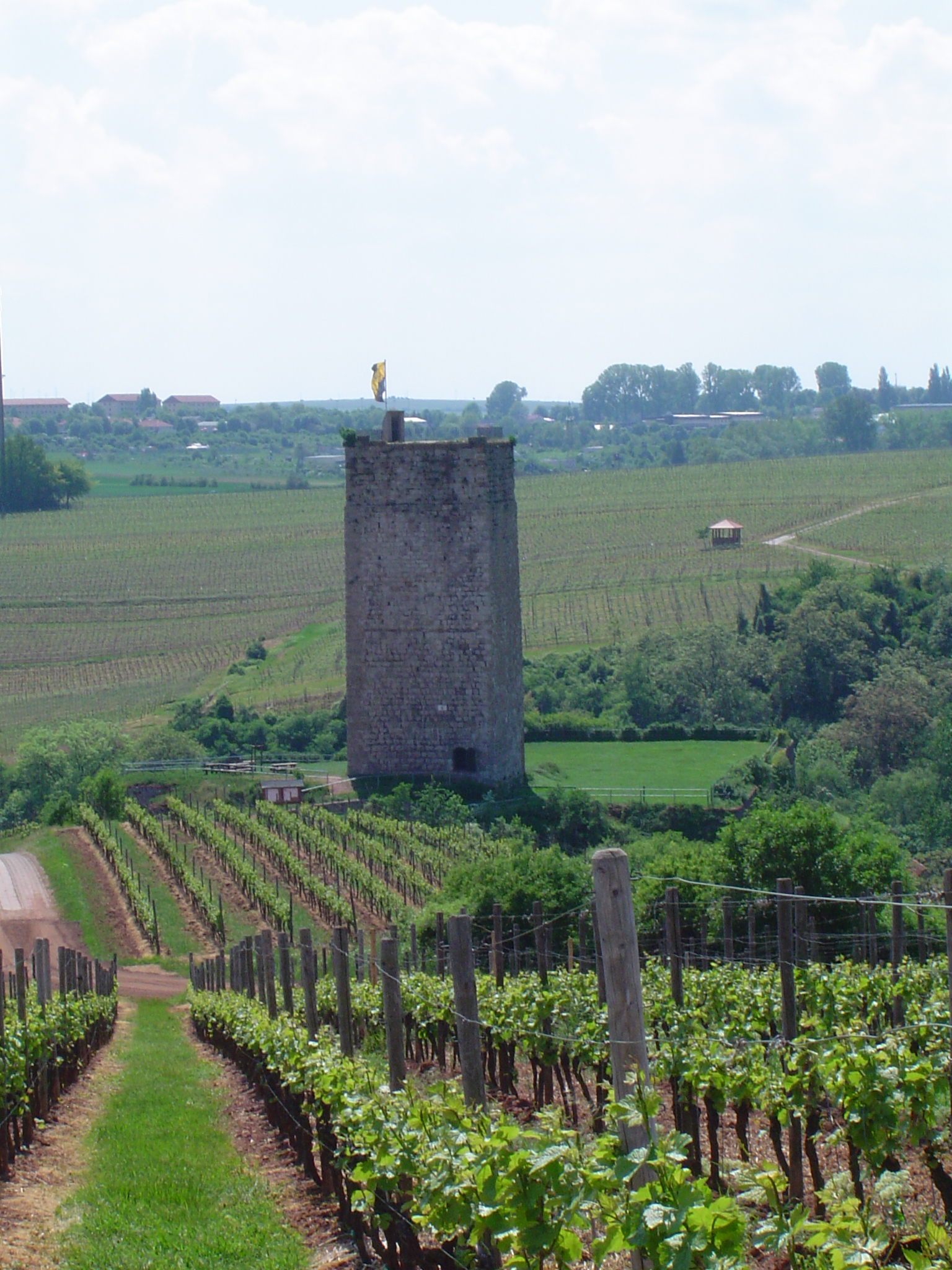 Burg Schwabsburg bei Nierstein